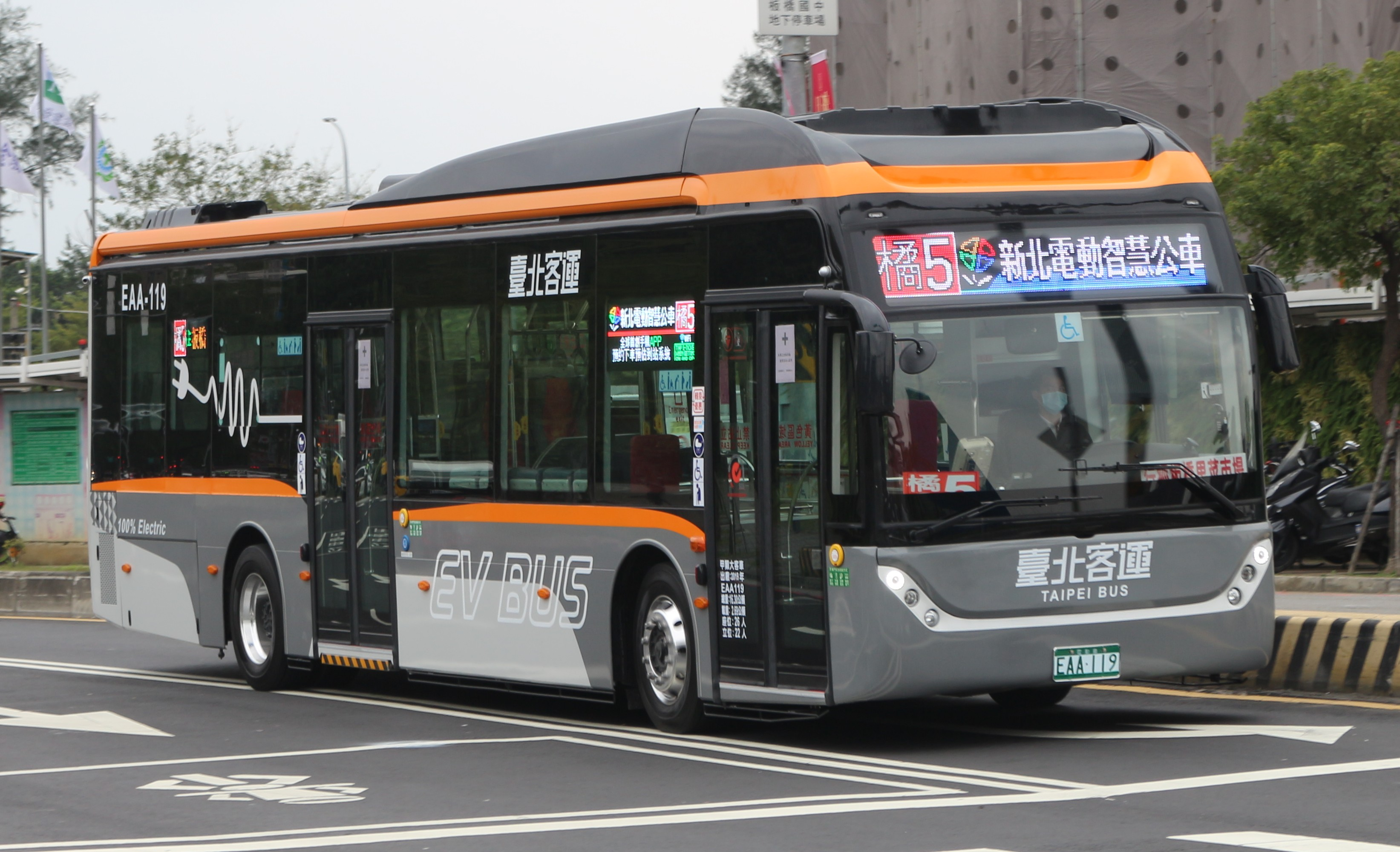 臺北客運BYD K9DA EAA-119 橘5